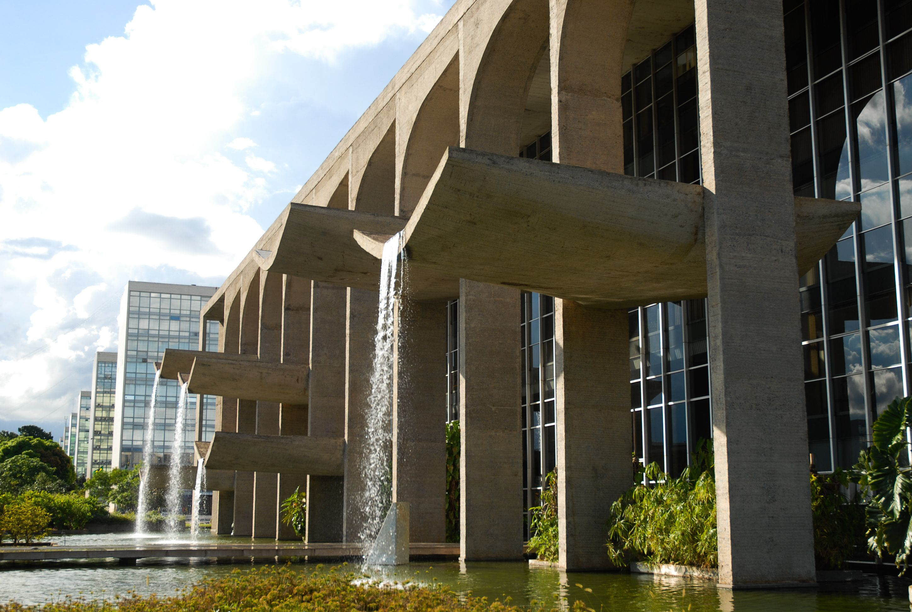 Brasília - A capital federal